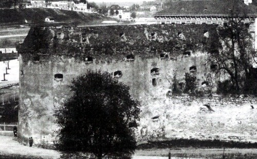 Bastionul curelarilor din Brasov